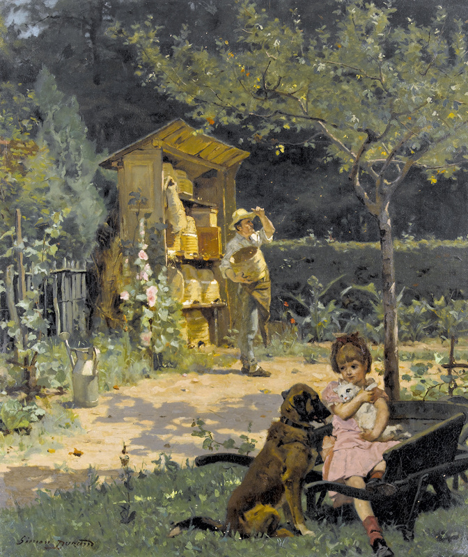 Garten mit Imker und spielendem Mädchen. Öl auf Leinwand, signiert, 68 x 58,5 cm